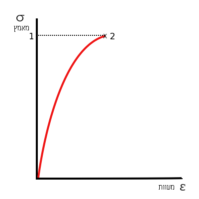 דיאגרמת מאמץ - מעוות של חומר פריך, ערך י.ש. 07:14, 28 במאי 2007 (IDT)